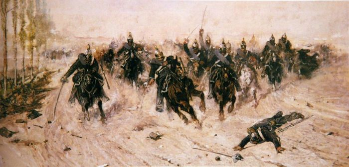 Carica della cavalleria piemontese alla battaglia della Sforzesca (21 marzo 1849) durante la prima guerra di indipendenza.